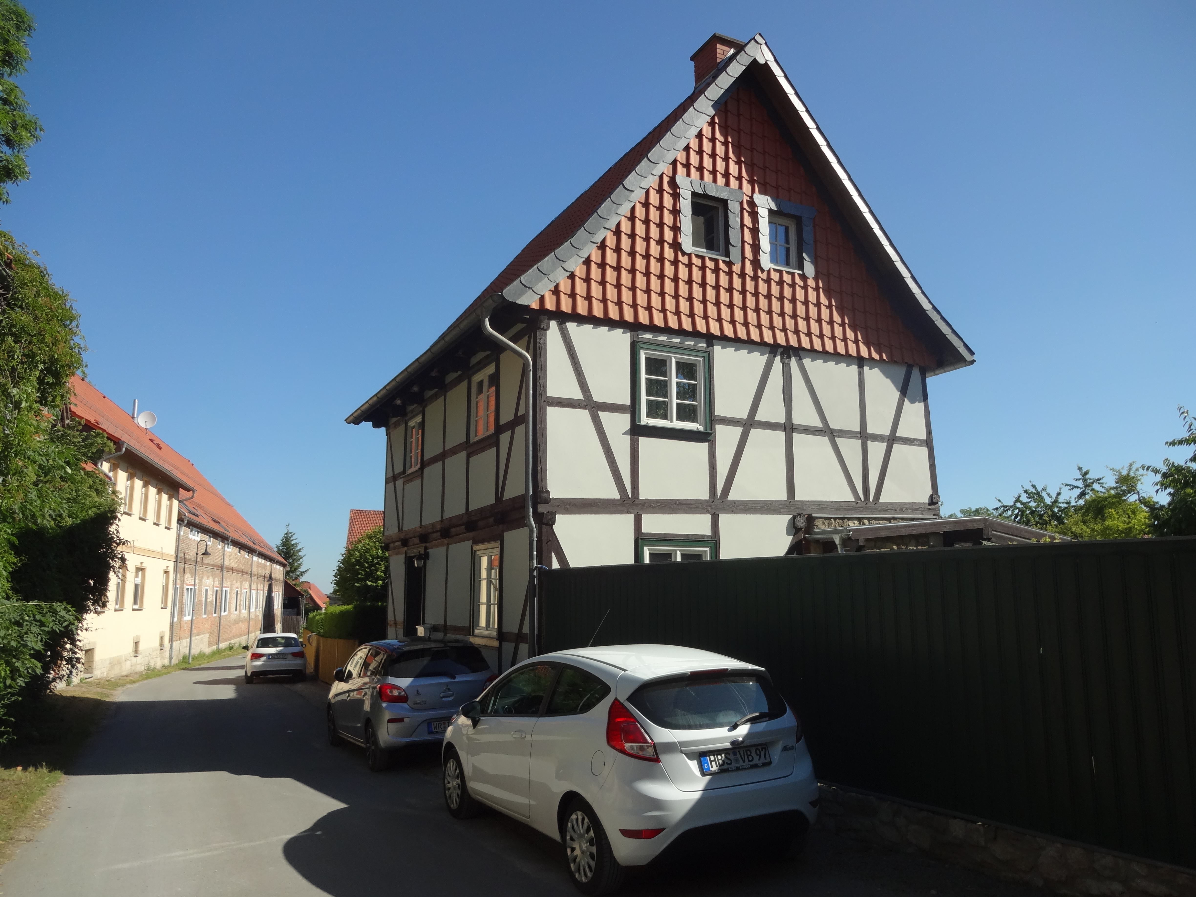 denkmalgeschütztes Bauernhaus Burgstraße 4 in Langeln, Gemeinde Nordharz